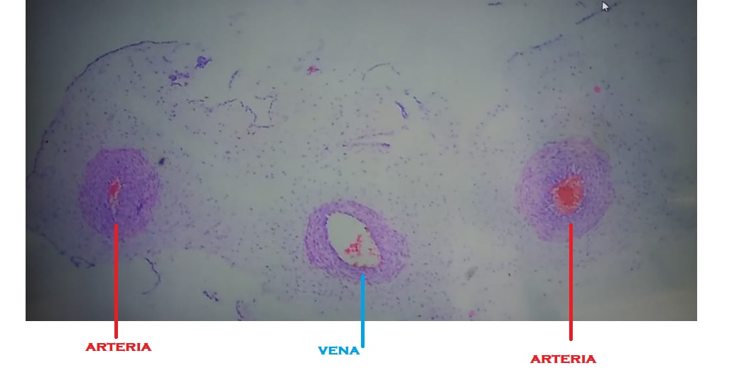 Órgano: Cordón umbilical Cortesía del departamento de morfología, área de histología laboratorio multifuncional, Universidad de Sucre.